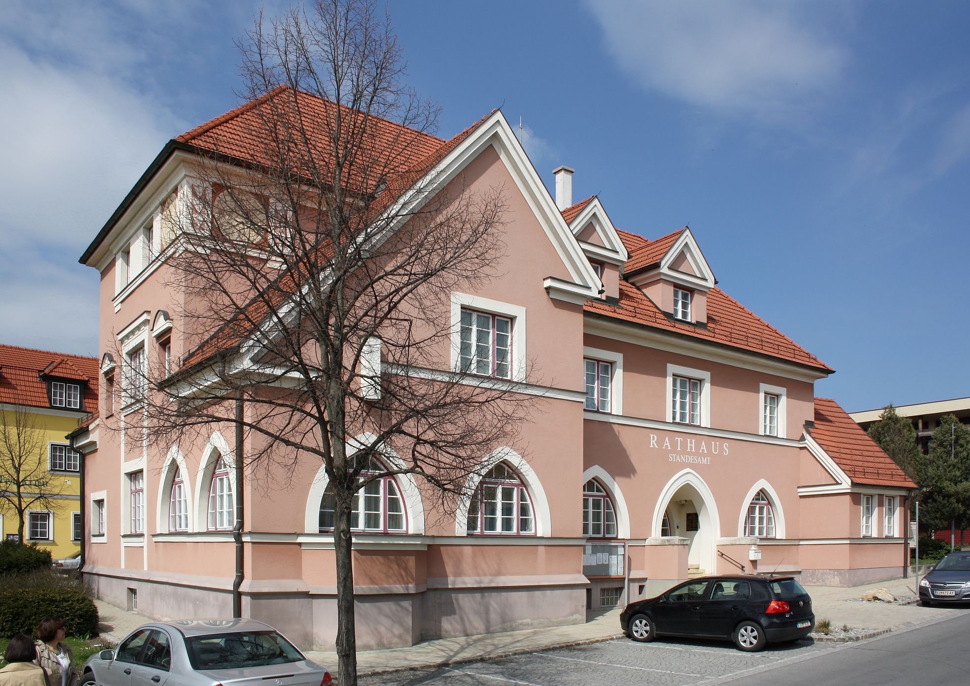 Das Radhaus der burgenländischen Marktgemeinde Hornstein.